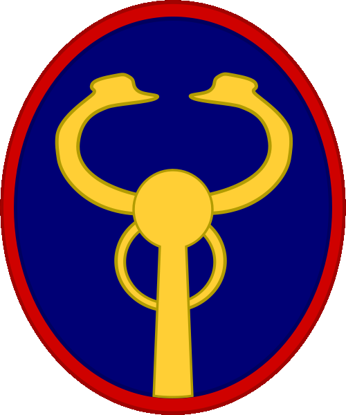 Scudo della Sexta Parthica